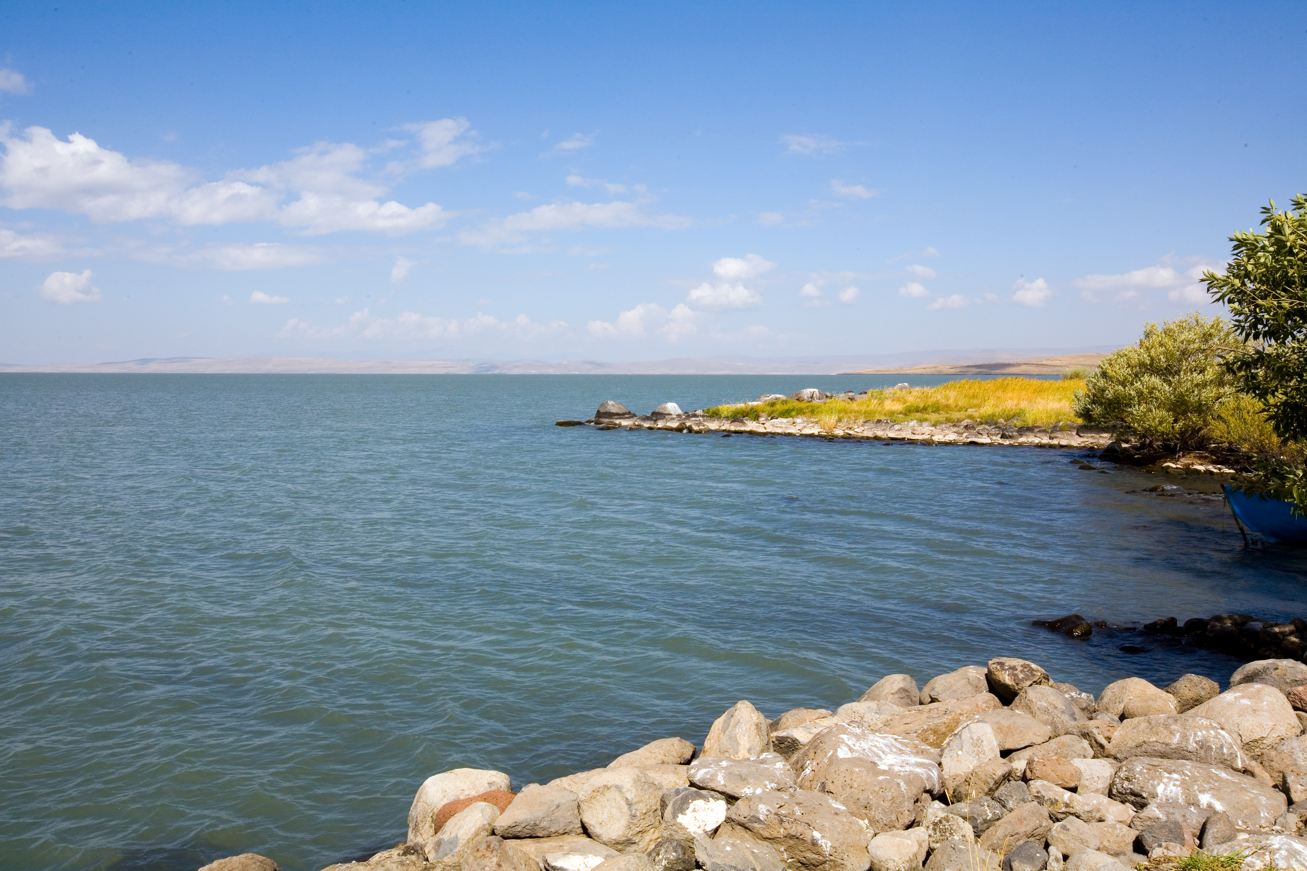 Lake Çıldır in Turkey.